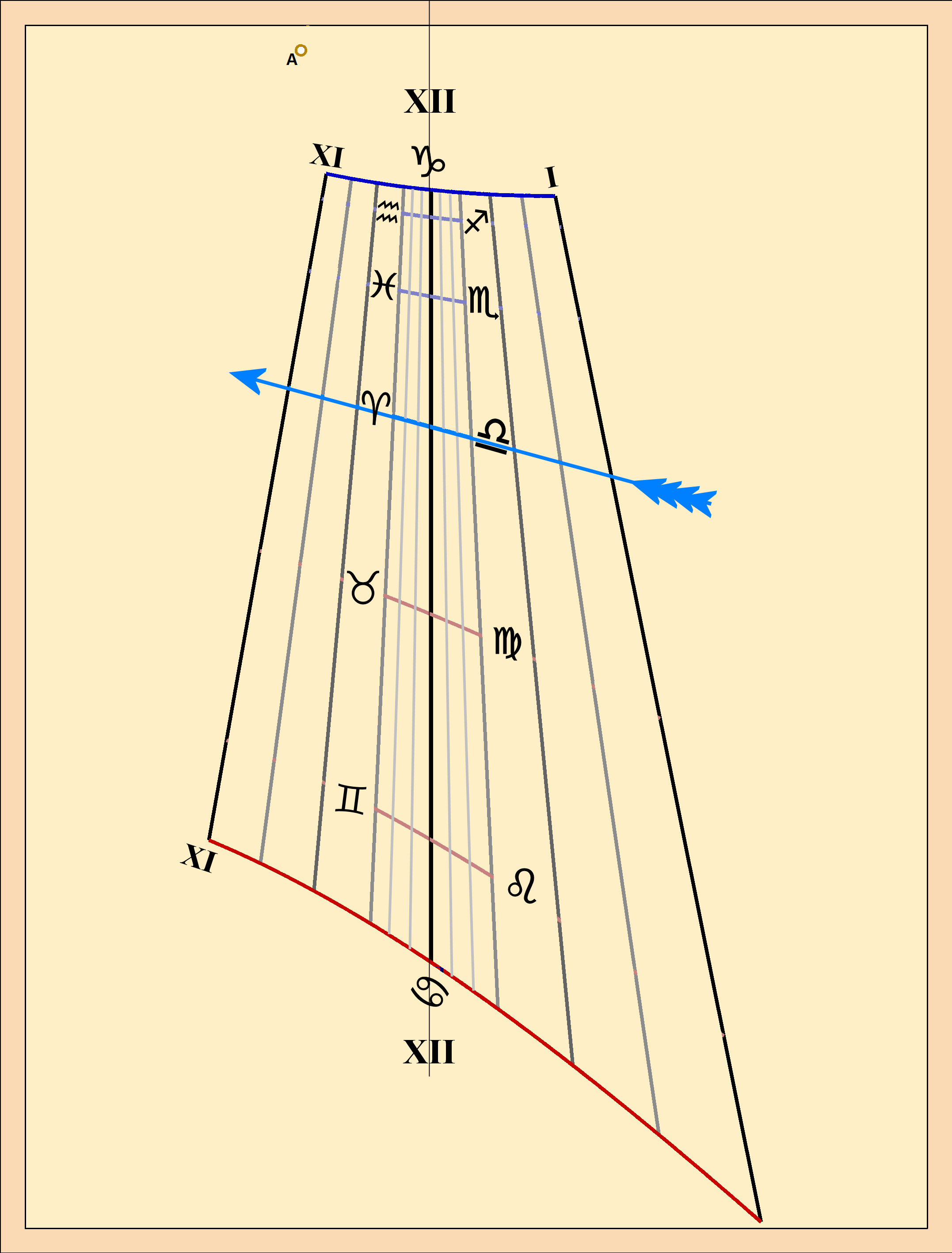 Dessin de la table d'une méridienne obtenu à partir du logiciel Shadows.